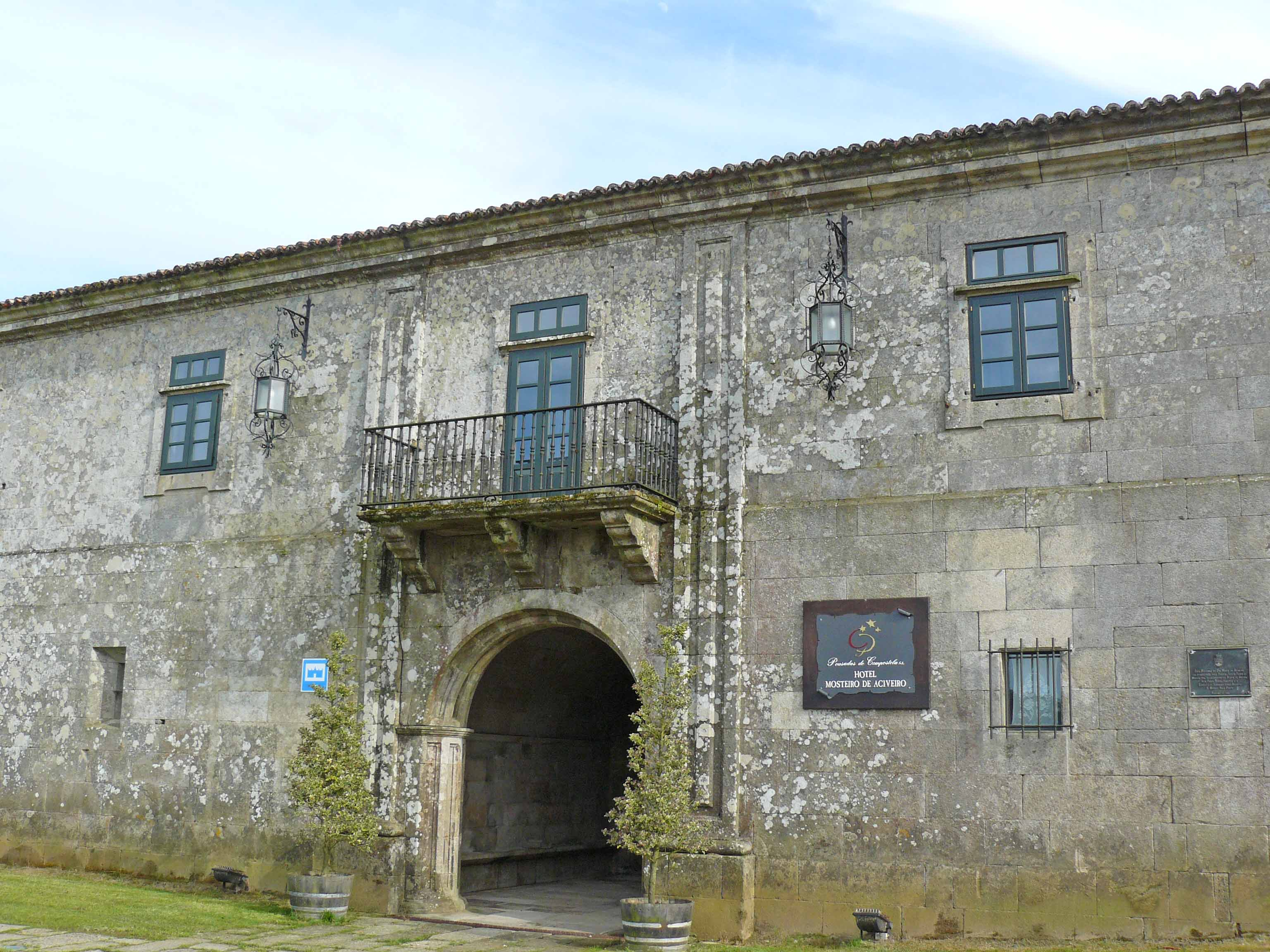 Portada do Mosteiro de Aciveiro